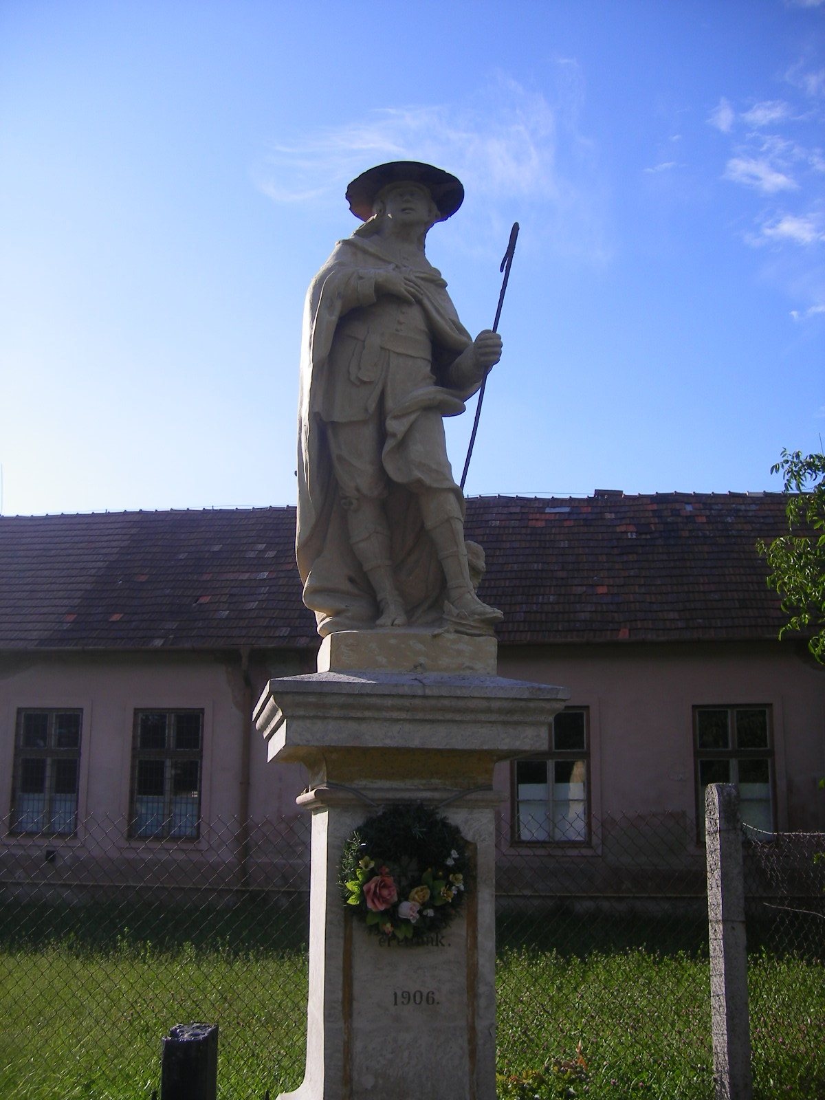 Nána - Szent Vendel szobra